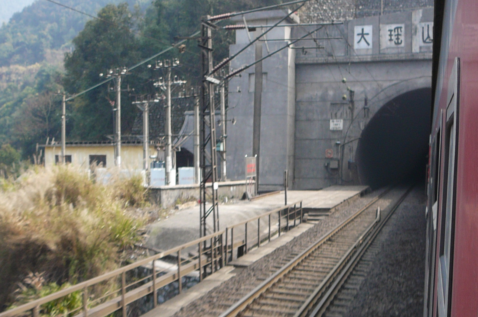 京広線大瑶山トンネル北口